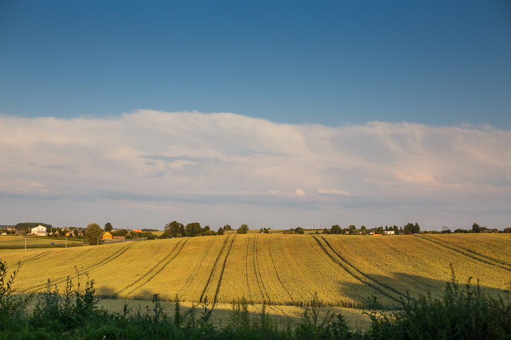 Fields